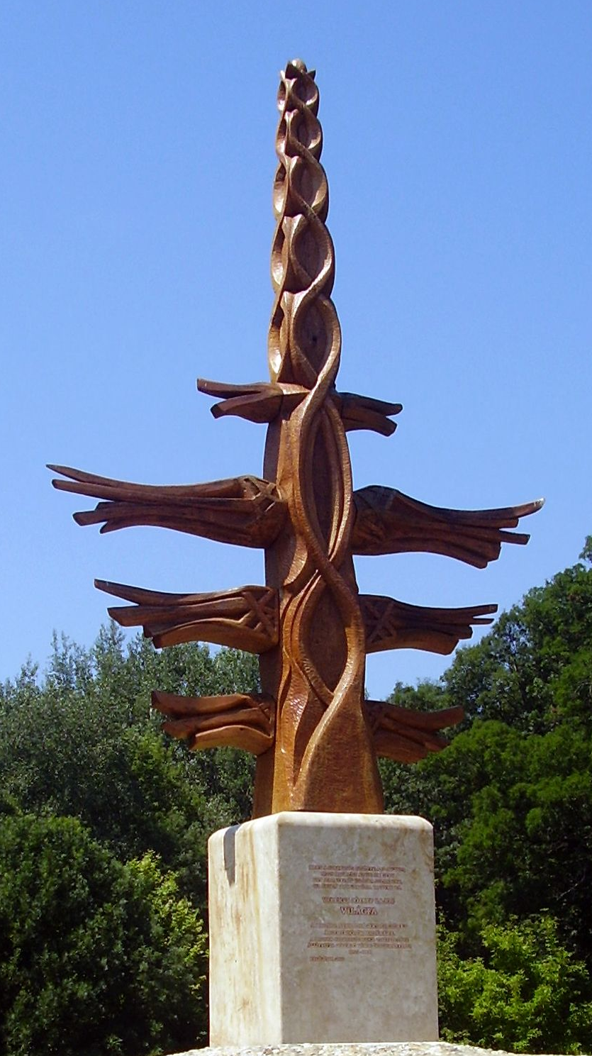 Világfa (world tree) sculpture in Gödöllőn, Pest, Budapest, Hungary.